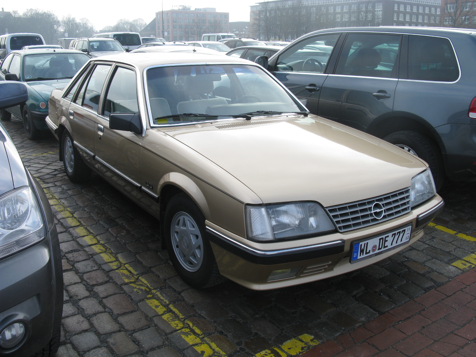 Opel Senator 3.0i